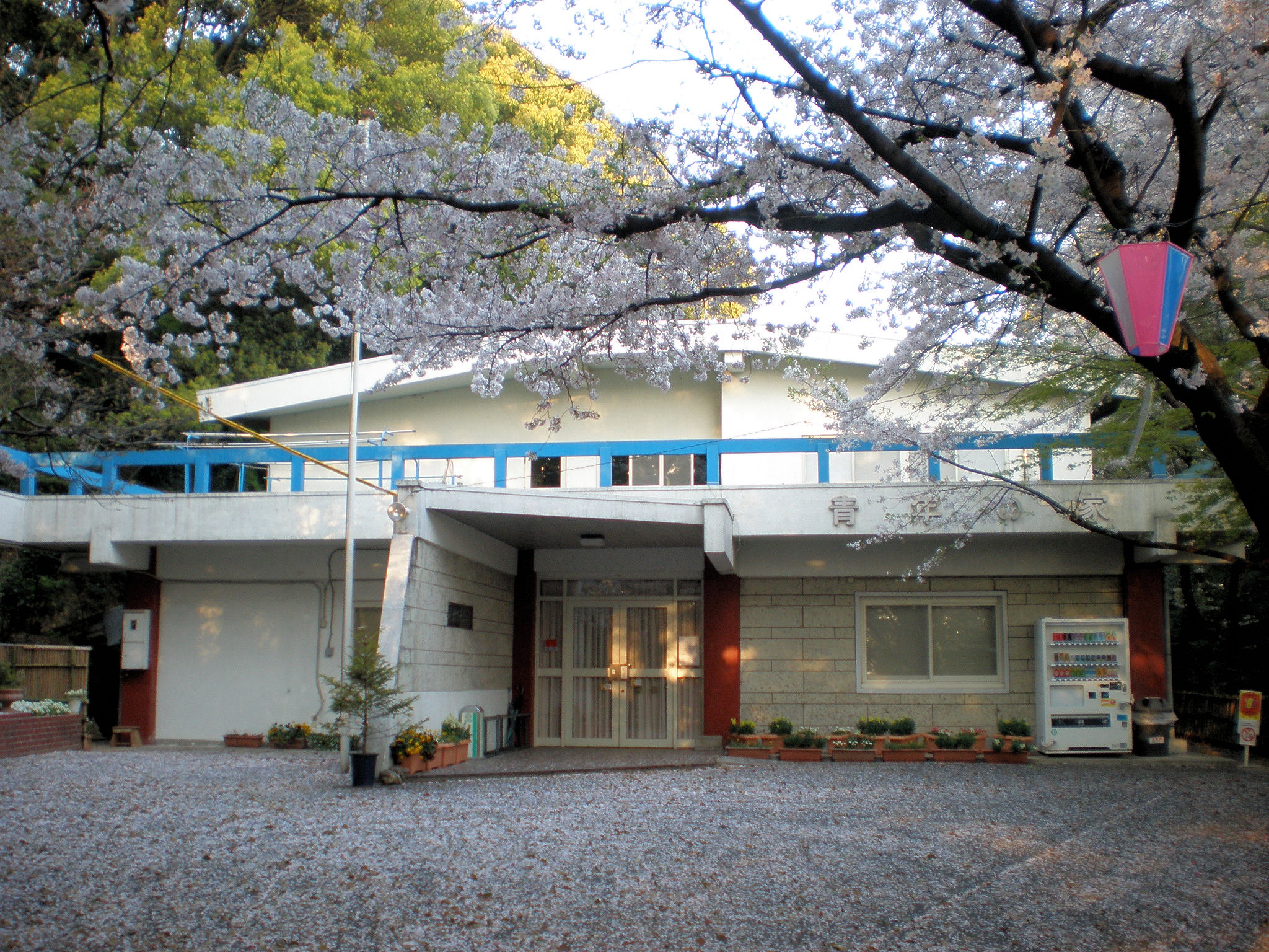 愛知県小牧市の小牧山にある青年の家